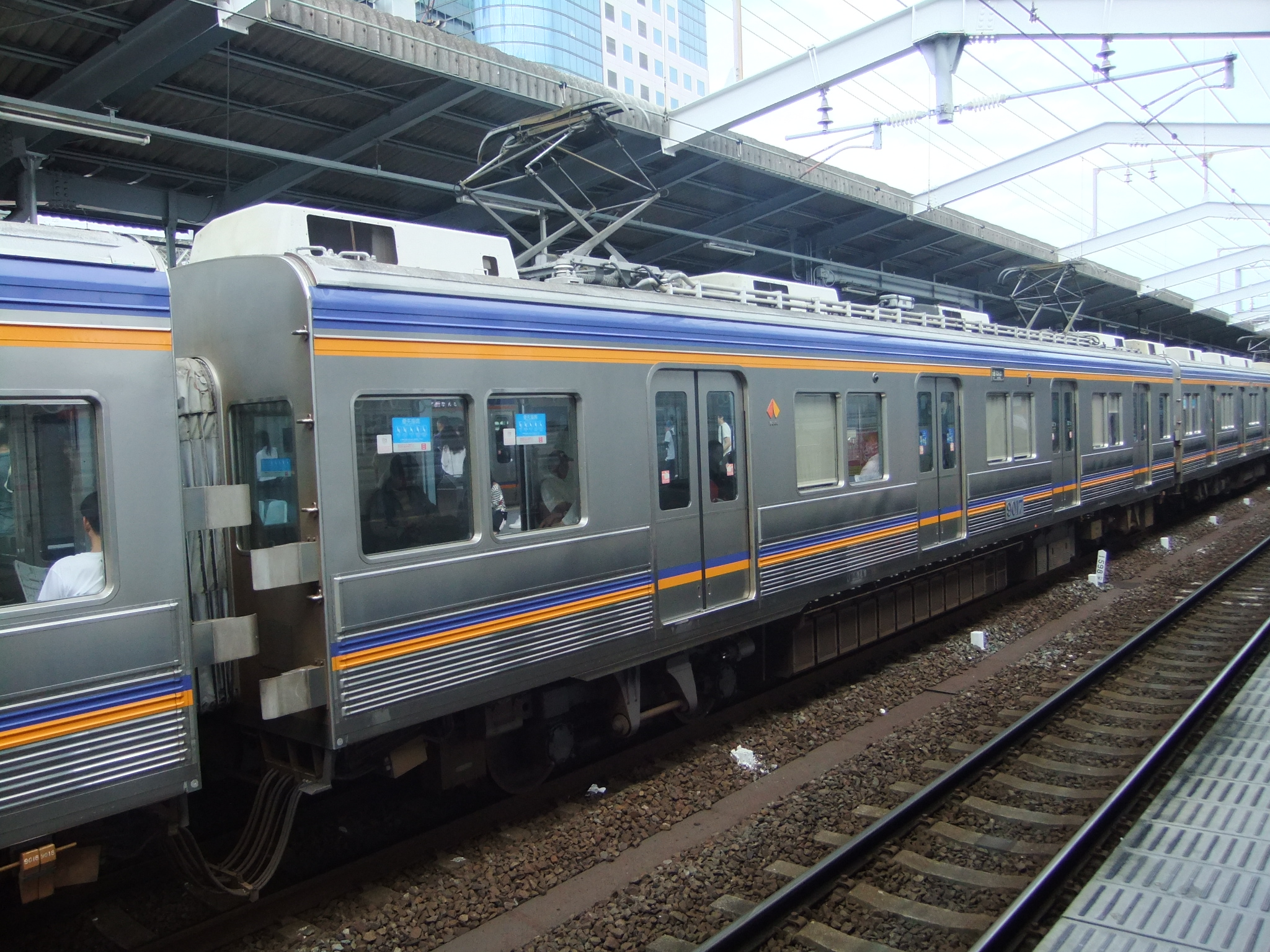 南海9000系 9017 堺駅